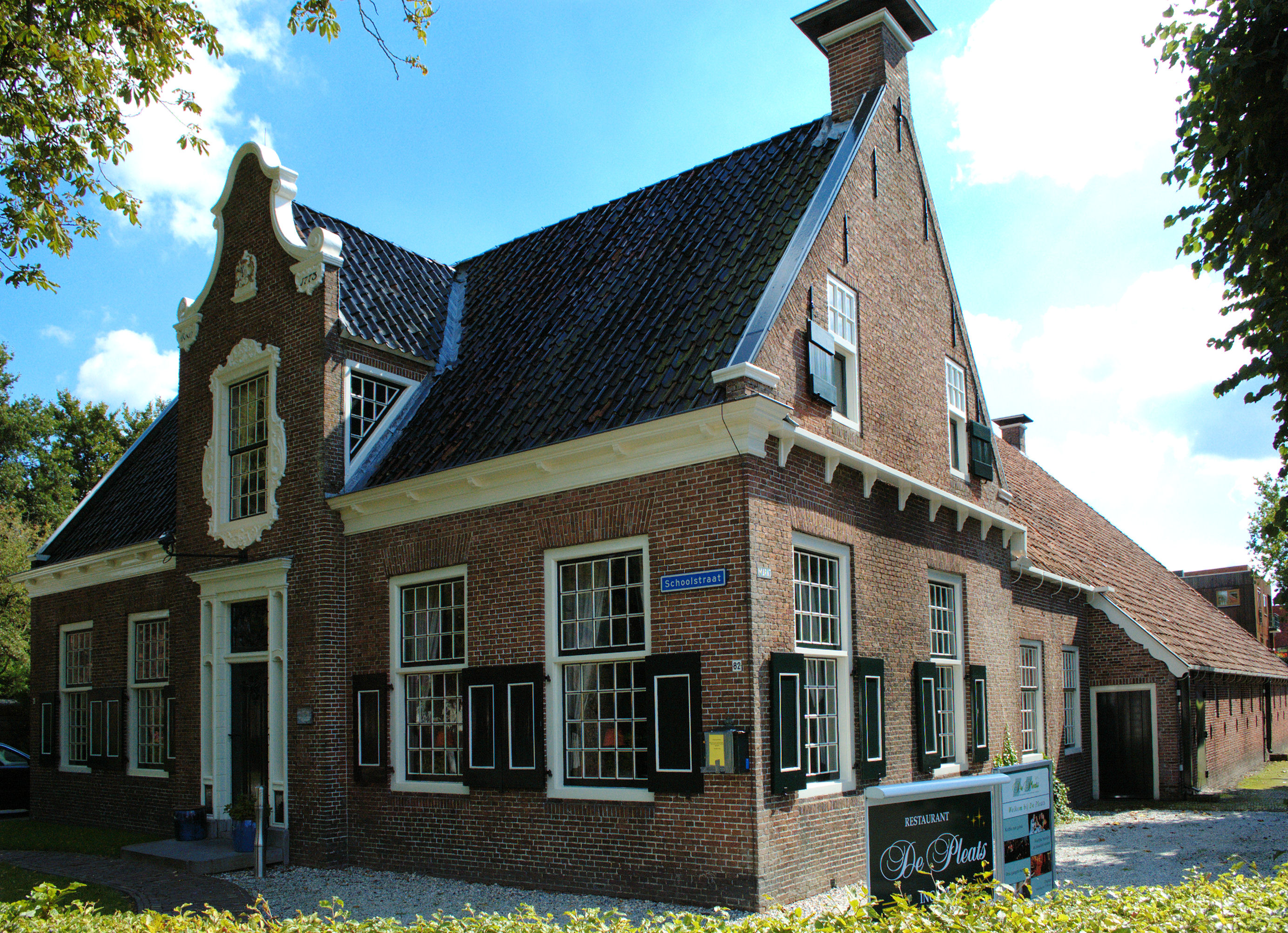 Voormalige boerderij, thans restaurant en cultureel centrum De Pleats, Schoolstraat 82, Burgum